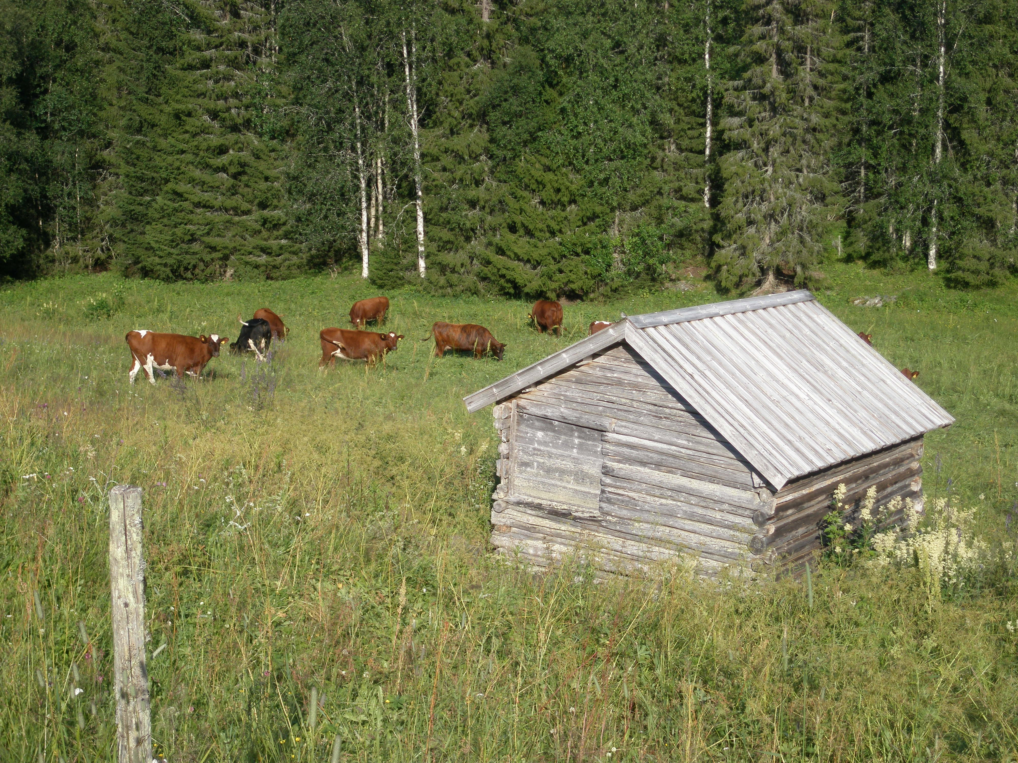 LappNilstorpet i Önet, Offerdal, Krokoms kommun, Jämtland, Sverige.